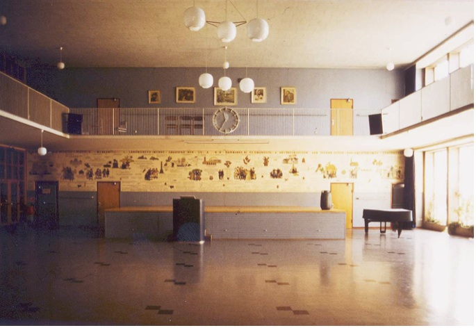 Bellahøj Skolens smukke aula med den historiske frise, der pryder de 3 vægge, inden den blev taget ned og opmagasineret i 1985